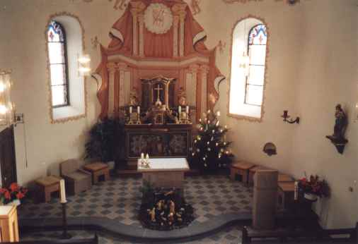 Schneppenbacher Kapelle, selbst fotografiert, gemeinfrei